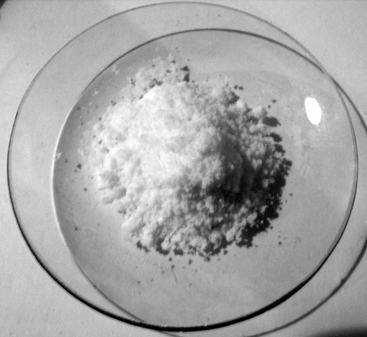 Sodium bromate NaBrO3